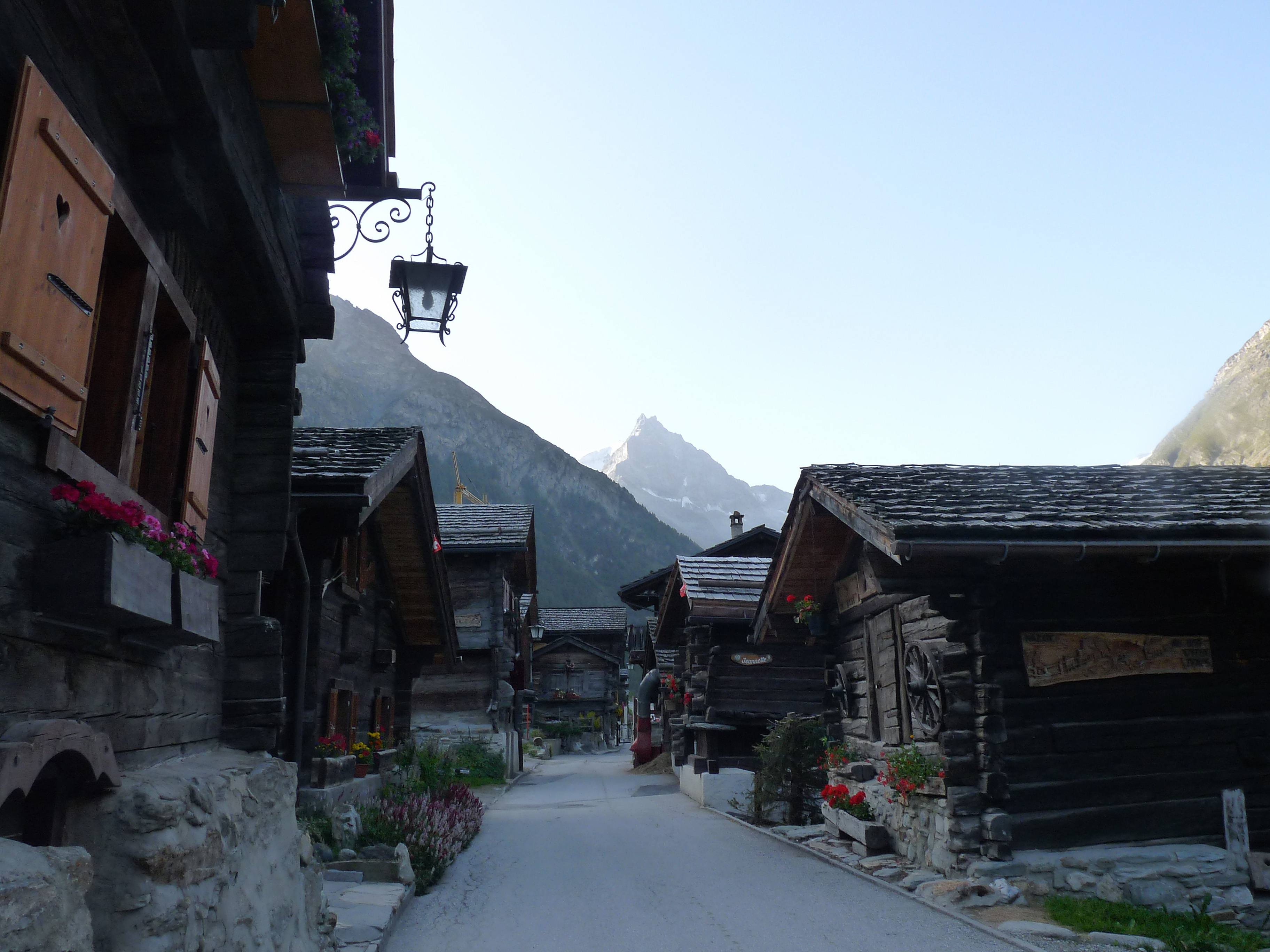 Zinal (Valais, Suisse) : Maisons en bois sur la route du Vieux Village